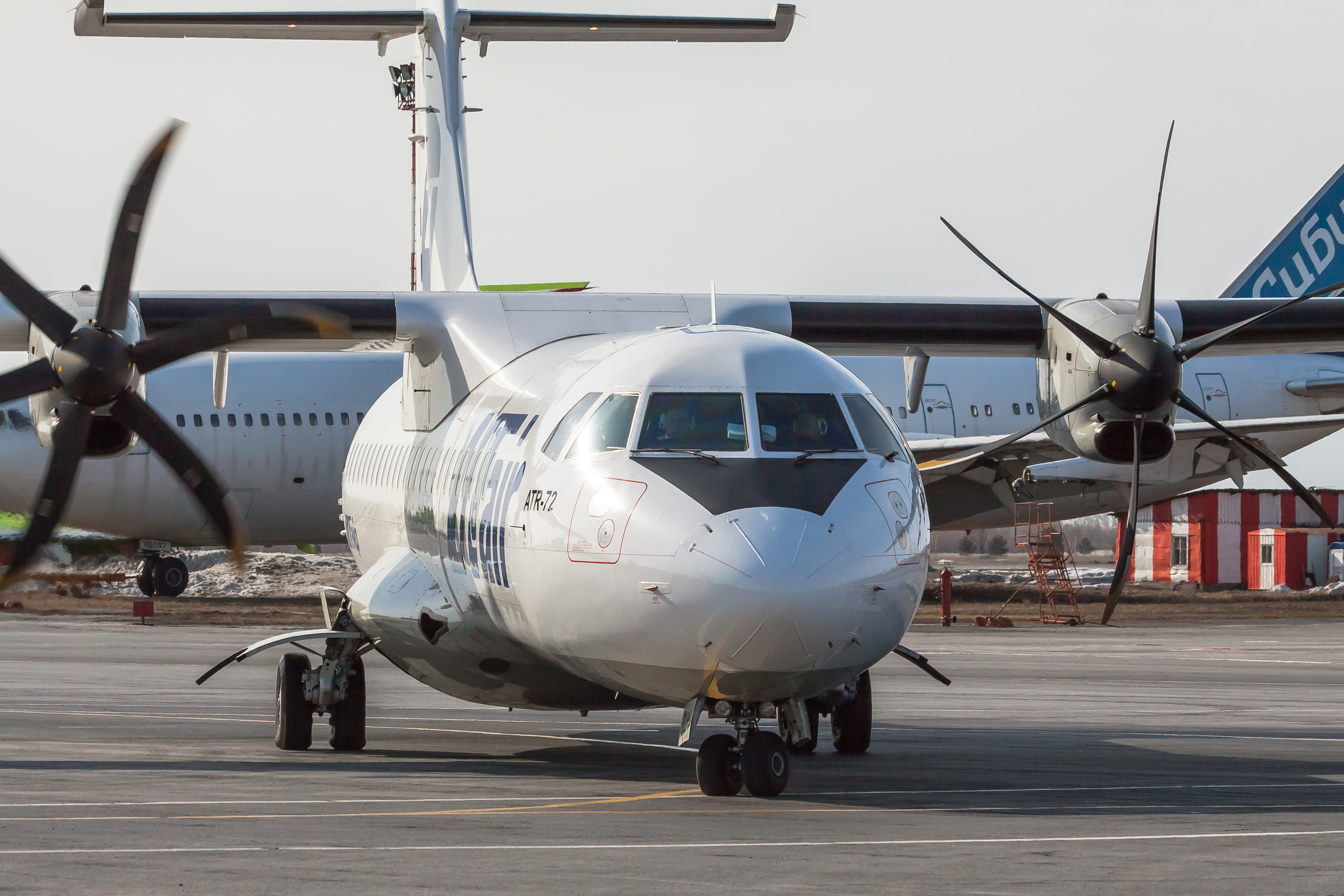 UTair ATR-72 from Nizhnevartovsk